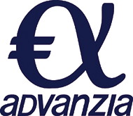 Logo der Advanzia Bank.